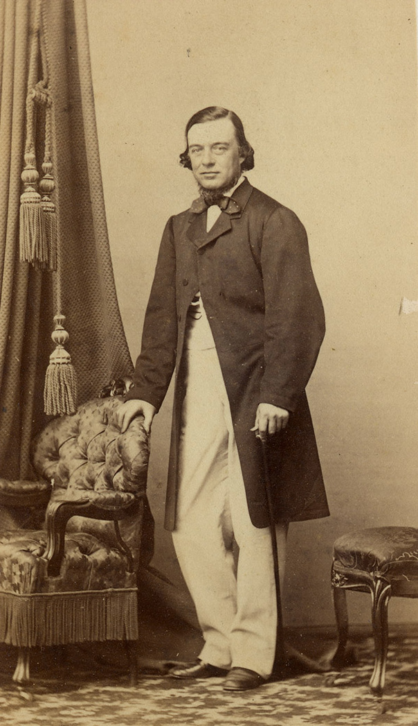 Henry Meiggs Williams (1811 - 1877)